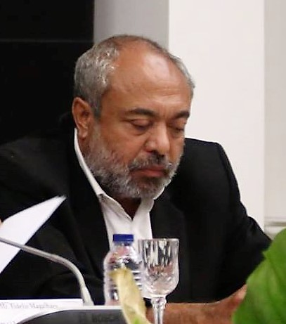 Avelino Coelho da Silva, osttimoresischer Politiker